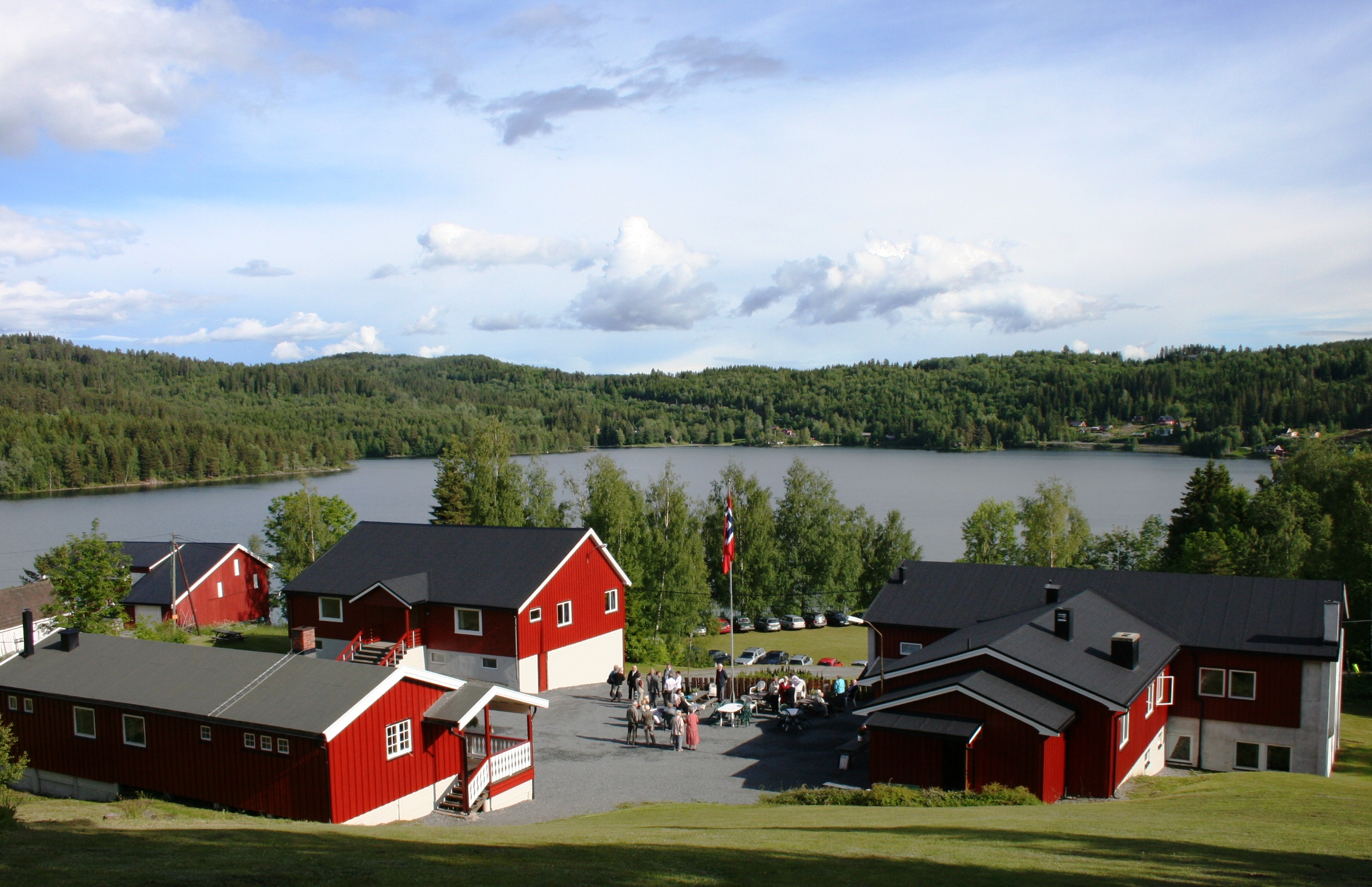 Solsetra leirsted, Nedre Eiker. Eier: Det Norske Misjonsselskap